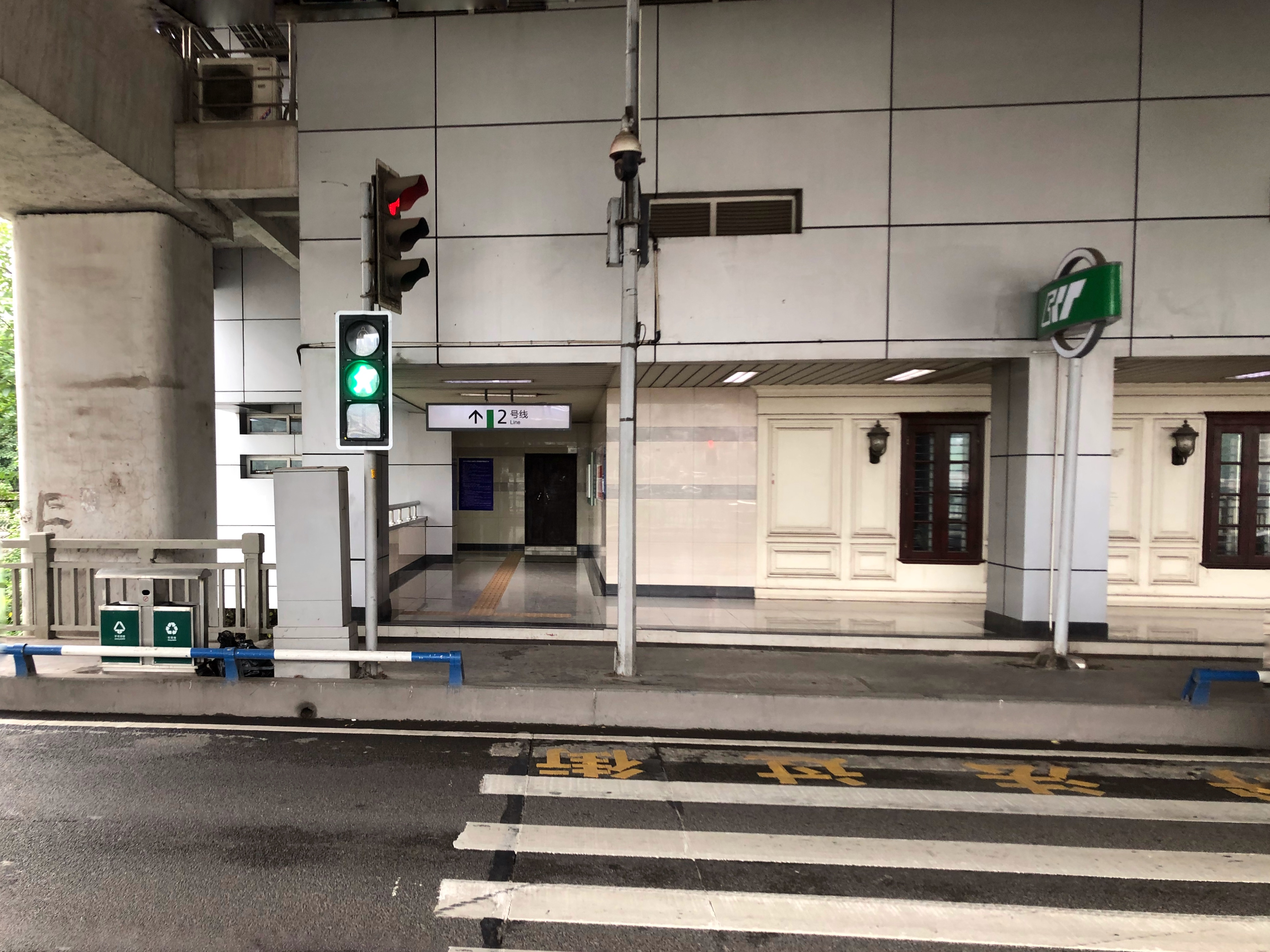 中文（中国大陆）: 2号线大溪沟站B出口